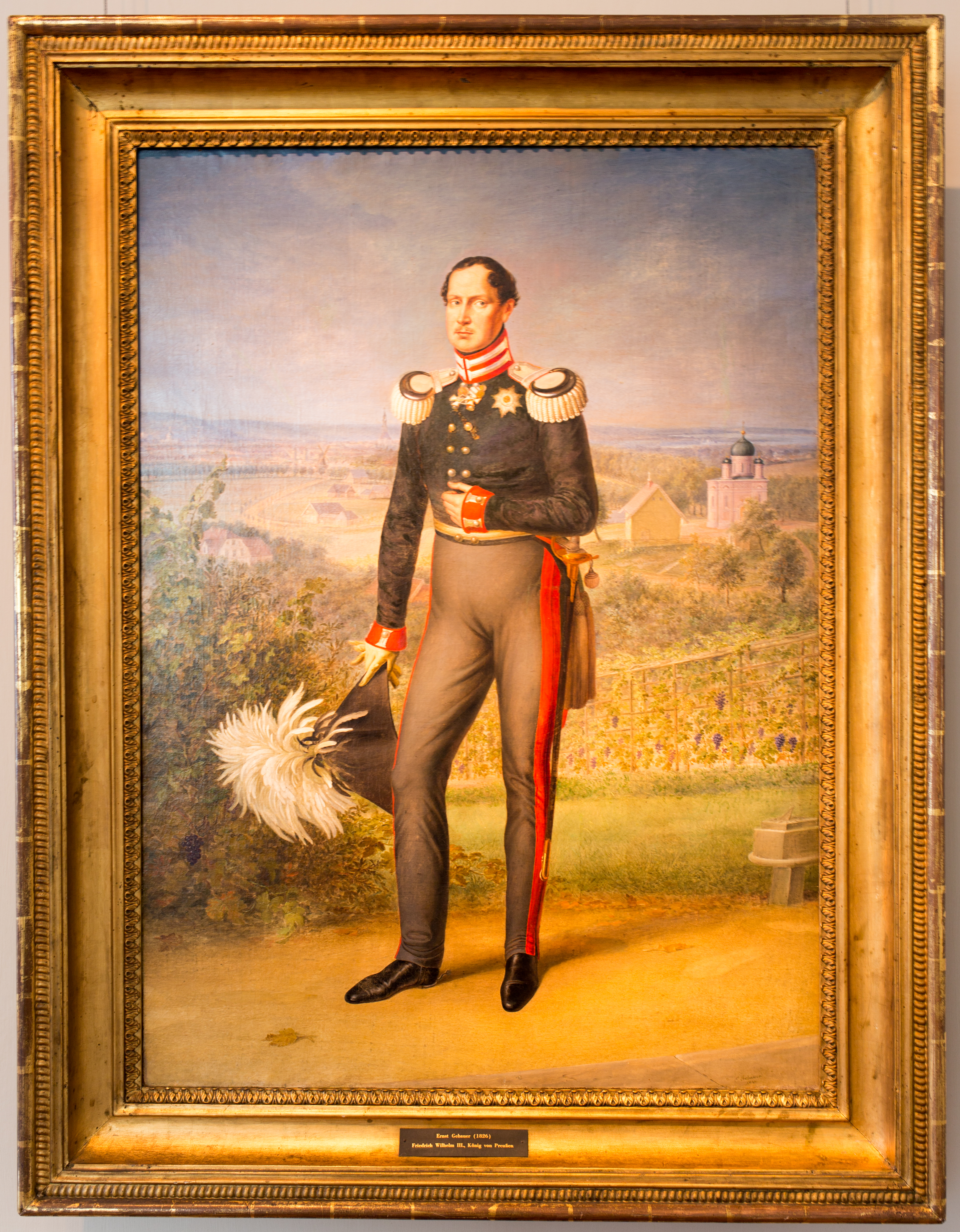 Ernst Gebauer Friedrich Wilhelm III. 1826 Erworben mit Mittel der Stiftung Deutsche Klassenlotterie Friedrich Wilhelm III. (1770–1849) vereinte 1817 die beiden Hauptvertreter des protestantischen Glaubens in Preußen, die Lutheraner und die Reformierten, in einer Kirchenunion. Das Porträt zeigt den König auf dem Pfingstberg in Potsdam. Im Hintergrund sind die russische Kapelle und die Siedlung Alexandra zu erkennen, deren Baubeginn mit dem Entstehungsjahr des Bildes 1826 zusammenfällt.Die Figur des Königs entspricht dem Typus des offiziellen Saatsporträts, das 1814 in Paris von Francois Gerard gemalt und 1825 von Carl Begas modifiziert wurde. Ernst Gebauer (1782–1865) kopierte diesen Typus mehrfach - mit wechselnden Hintergründen oder auch nur als Brustbild.